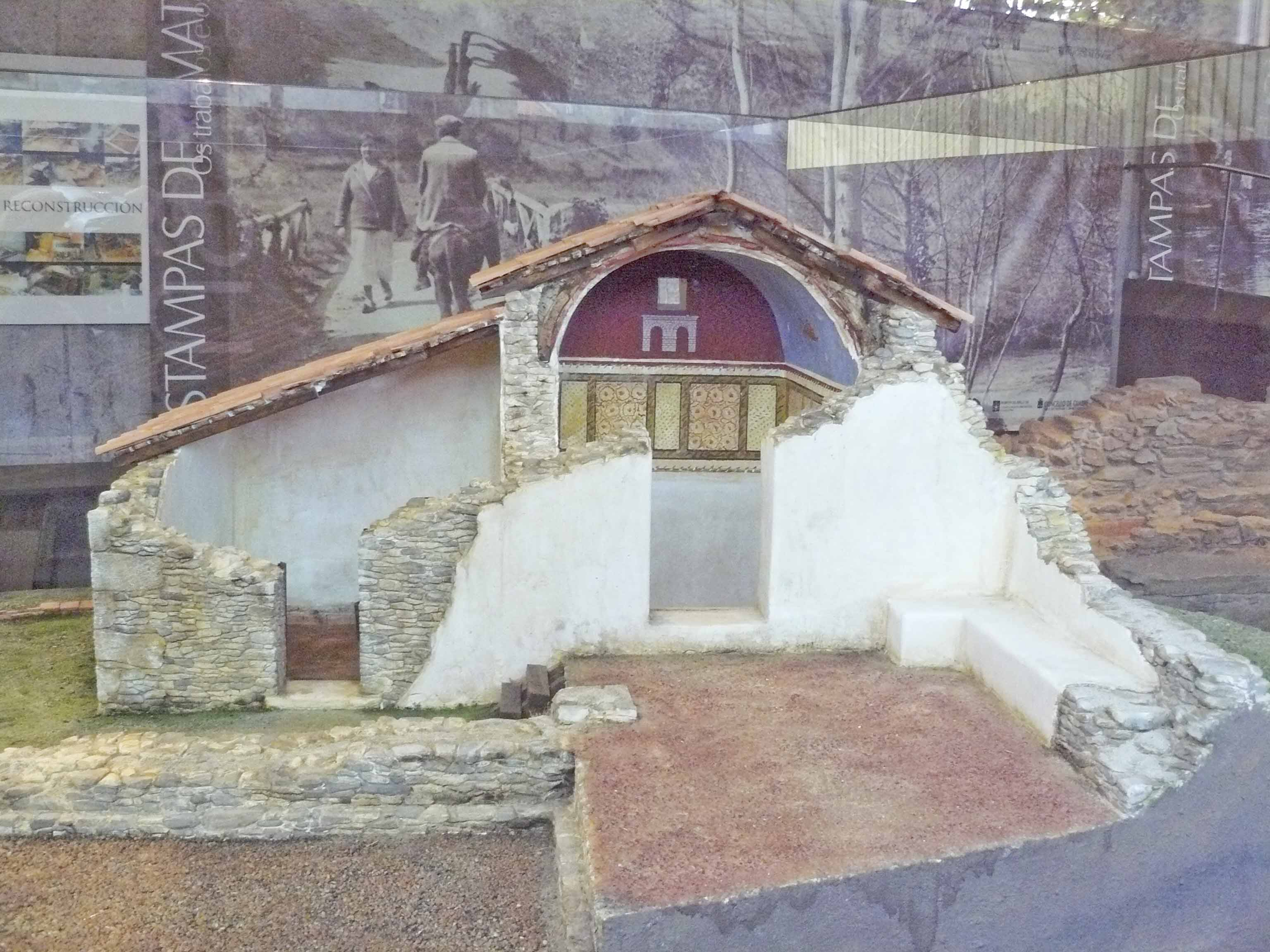 Maqueta que reproduce o Balneum e as Letrinae na Vila romana de Cambre